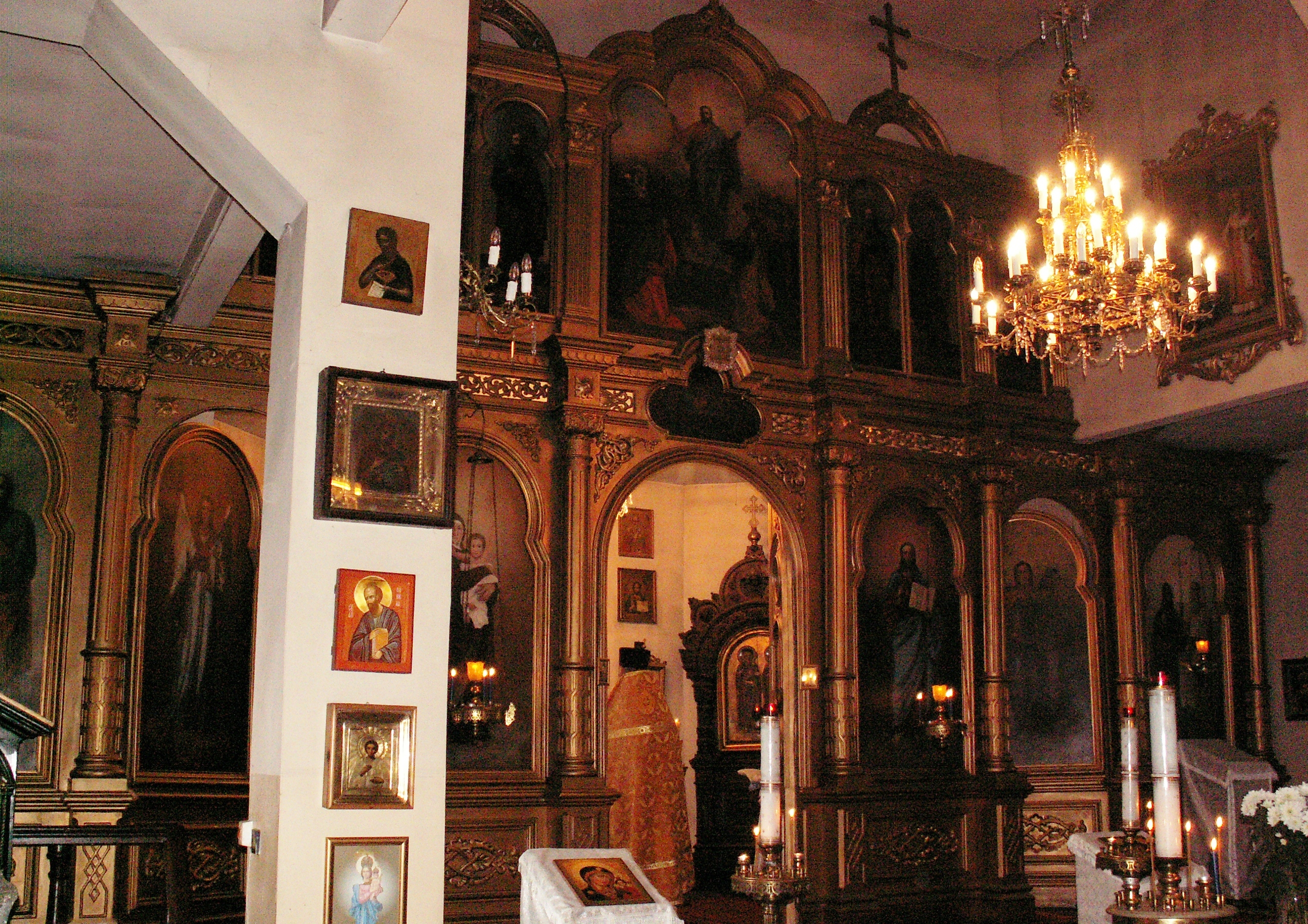 Ikonostas w cerkwii w Poznaniu